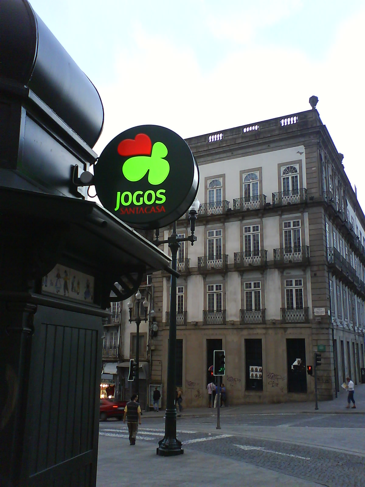 Me encantó este logo. El concepto del trebol de cuatro hojas está ya muy manido, pero me ha gustado esta forma de resolverlo. La cuarta hoja del trébol, la de la suerte (only available on several faithful requests by pry to the virgin Mary ;-)) la hoja más querida y deseada (por eso un corazón) y de paso, los colores de la bandera portuguesa. Sencillo pero en mi opinión, muy bien resuelto.